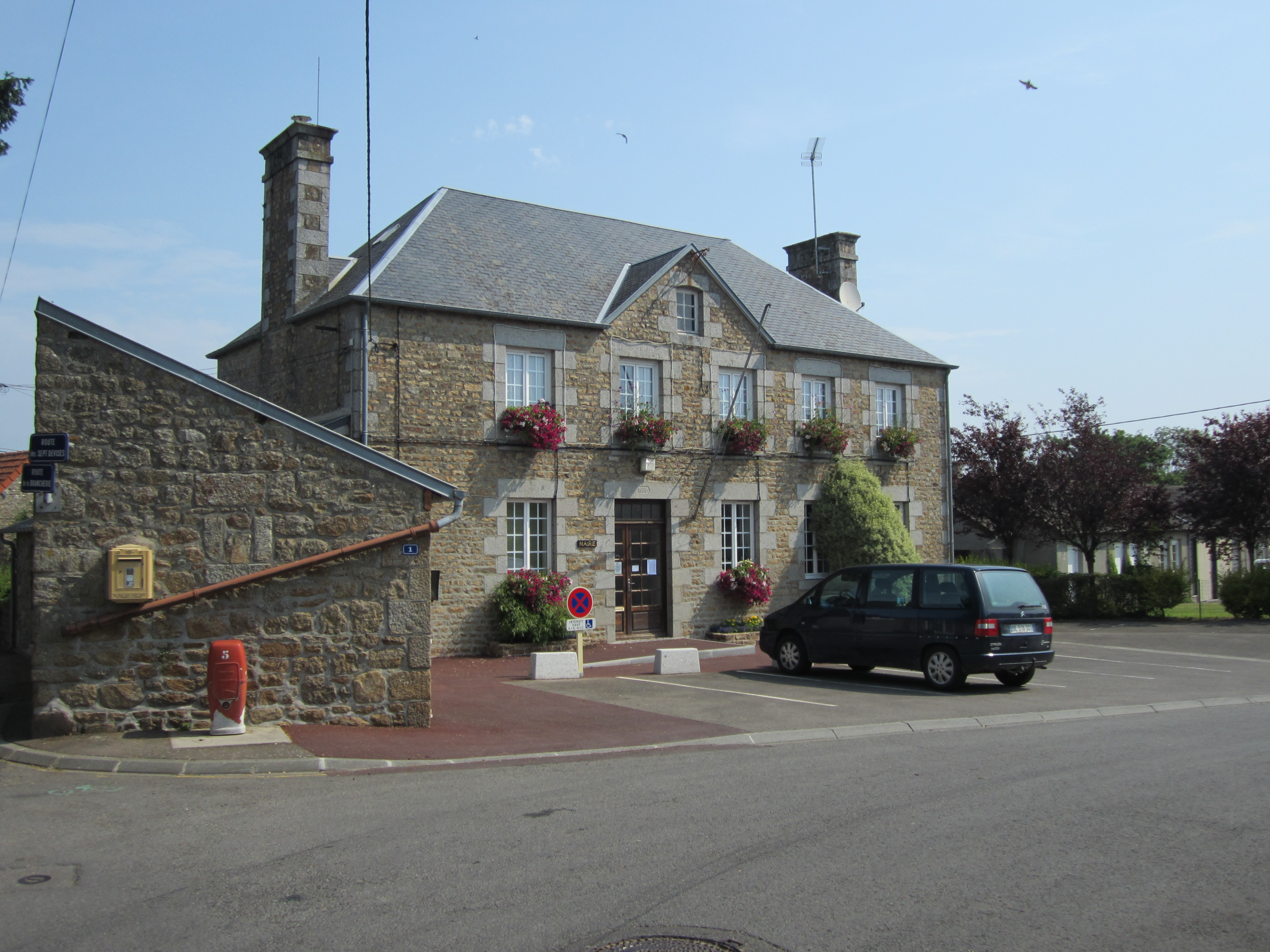 Saint-Michel-des-Loups, commune associée de Jullouville, Manche